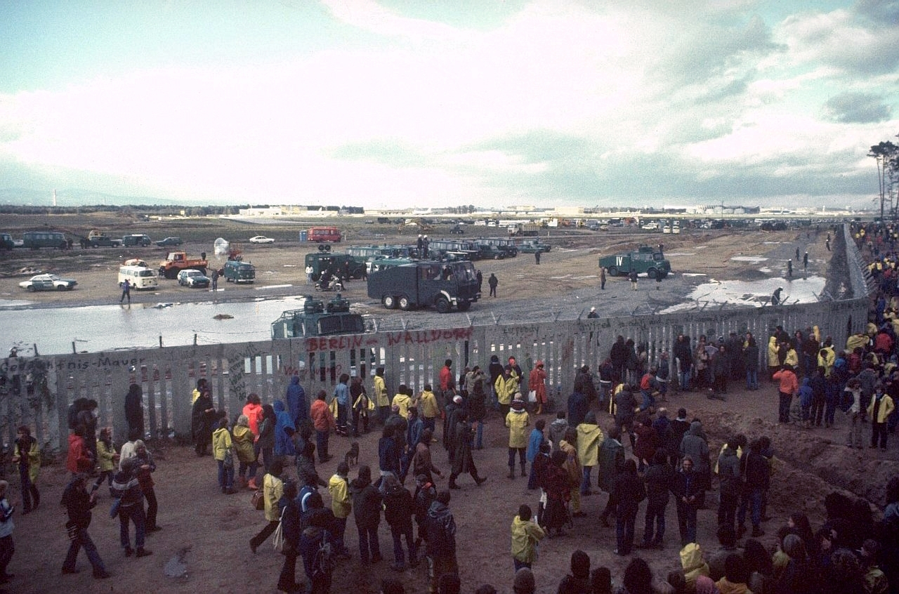 Betonzaun vor der im Bau befindlichen Startbahn West des Frankfurter Flughafens.